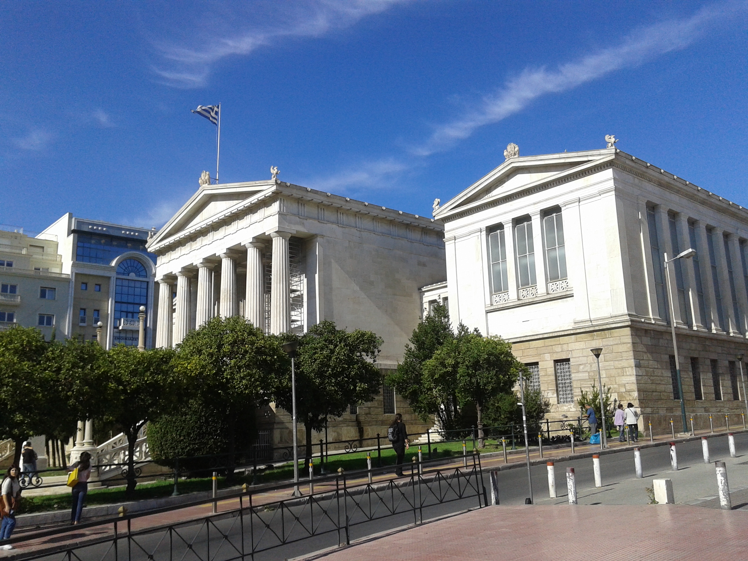 Εθνική Βιβλιοθήκη«Εθνική Βιβλιοθήκη»